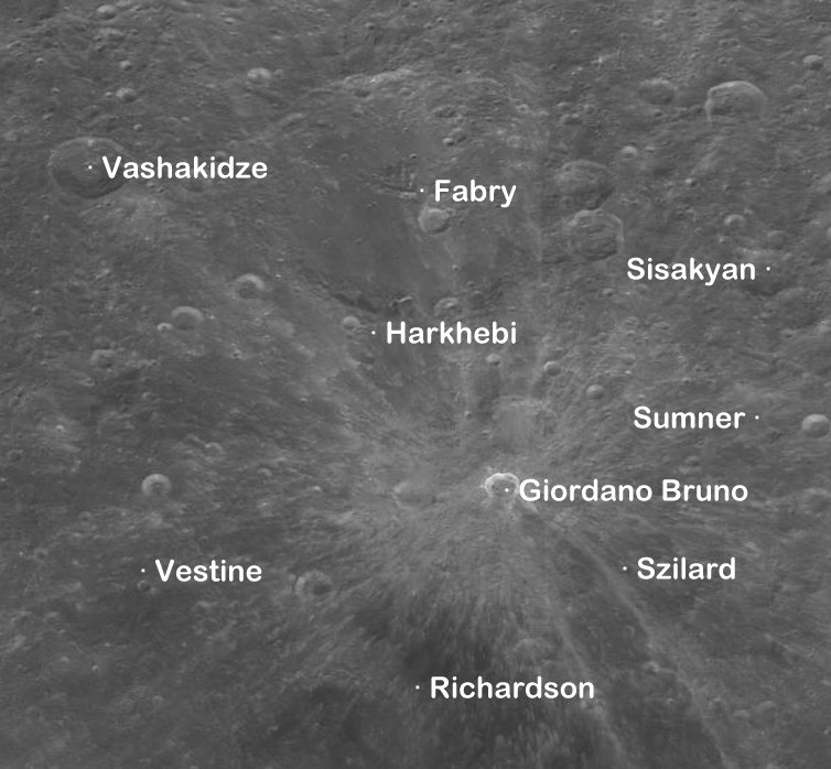 Cráter lunar Giordano Bruno. Sistema de marcas radiales. (Imagen Misión Clementine)